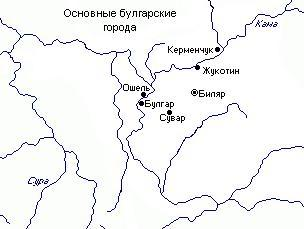 Расположение основных булгарских городов